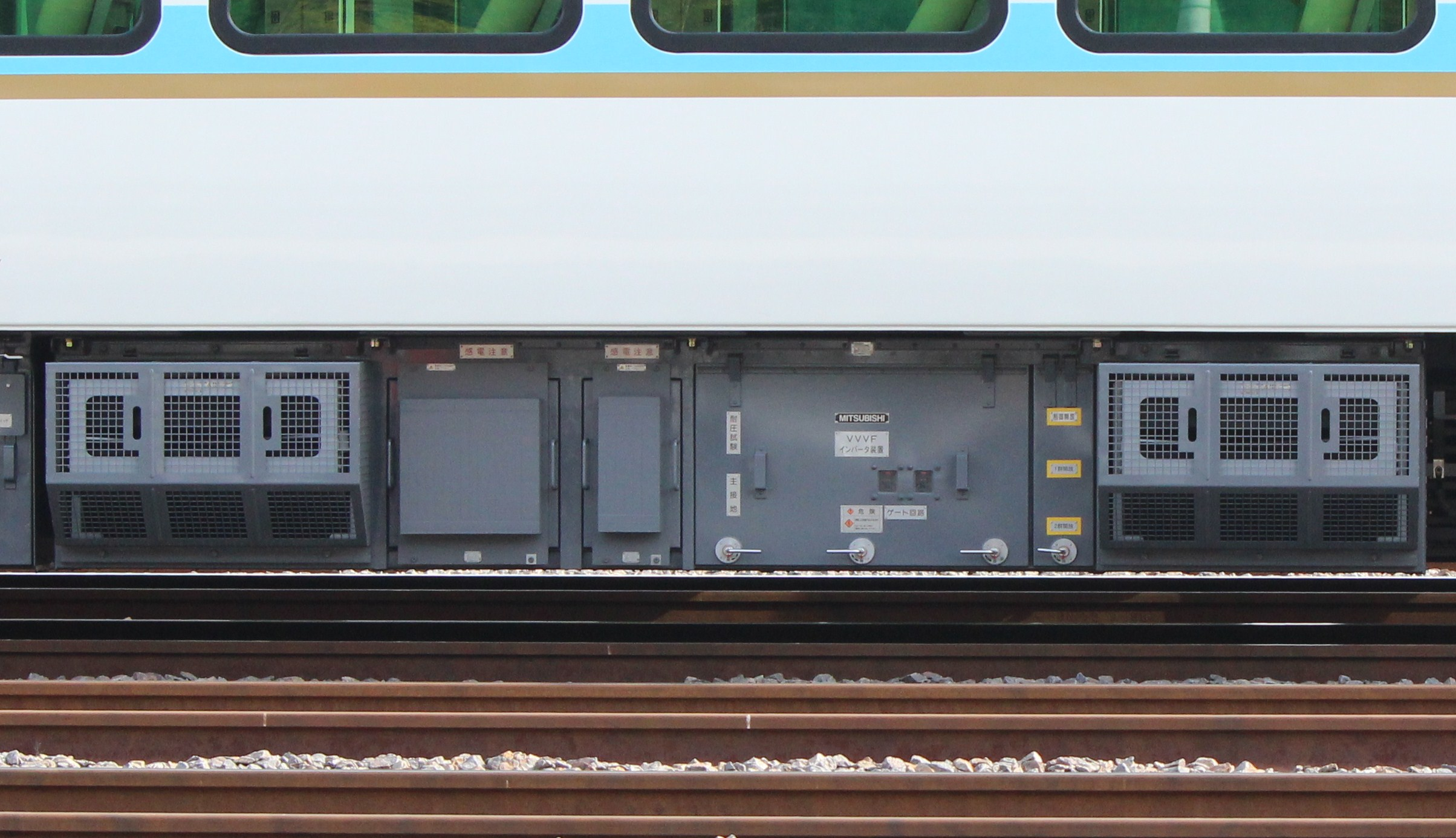 近鉄50000系VVVF制御装置